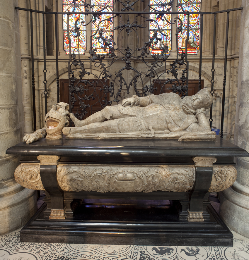 Praalgraf van 1601-1602 - 'aartshertog Ernst van Oostenrijk (+1595)' (Robrecht Colijns de Nole)